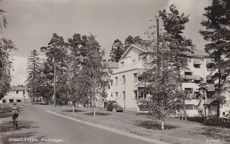 Smedslätten vid Alviksvägen i Bromma, väster om Stockholm, på 1940-talet, kvarteret Hobergsgubben vid norra delen av Smedslättens gårds område, "Sunnerdahlsområdet", som byggdes åren 1939-1940.